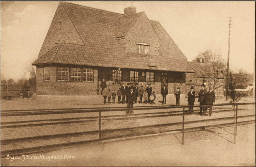 Identifier JvmKCAC16856 Subject Sya station. Avbildad, ort Sverige Östergötland Mjölby Sya General subject term Porträtt Specific subject terms Station Telefonlinje Stationshus Barn Man Add a comment or suggest edits History Fotografering Fotograf Nilsson, E Add a comment or suggest edits Classification Linköping - Tranås BA 365 Statens J, SJ, 1435[Ursprungsbolag] BO 201 References Status Godkänd Status publ Publicering License information License Contact owner for more information Metadata Identifier JvmKCAC16856 Part of collection Järnvägsmuseets foton Owner of collection Järnvägsmuseet Institution Järnvägsmuseet Date published December 29, 2018 Date updated April 2, 2019 DIMU-CODE 021018115188 UUID 0AB2EE1C-BFB0-45AD-B585-D2BD847B64F9